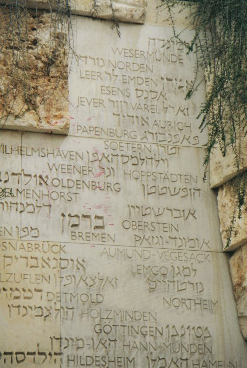 Gedenktafel im "Tal der Gemeinden" der israelischen Holocuast-Gedenkstätte Yad Vashem. Die Tafel listet zerstörte jüdische Gemeinden in Norddeutschland und Ost-Friesland auf.